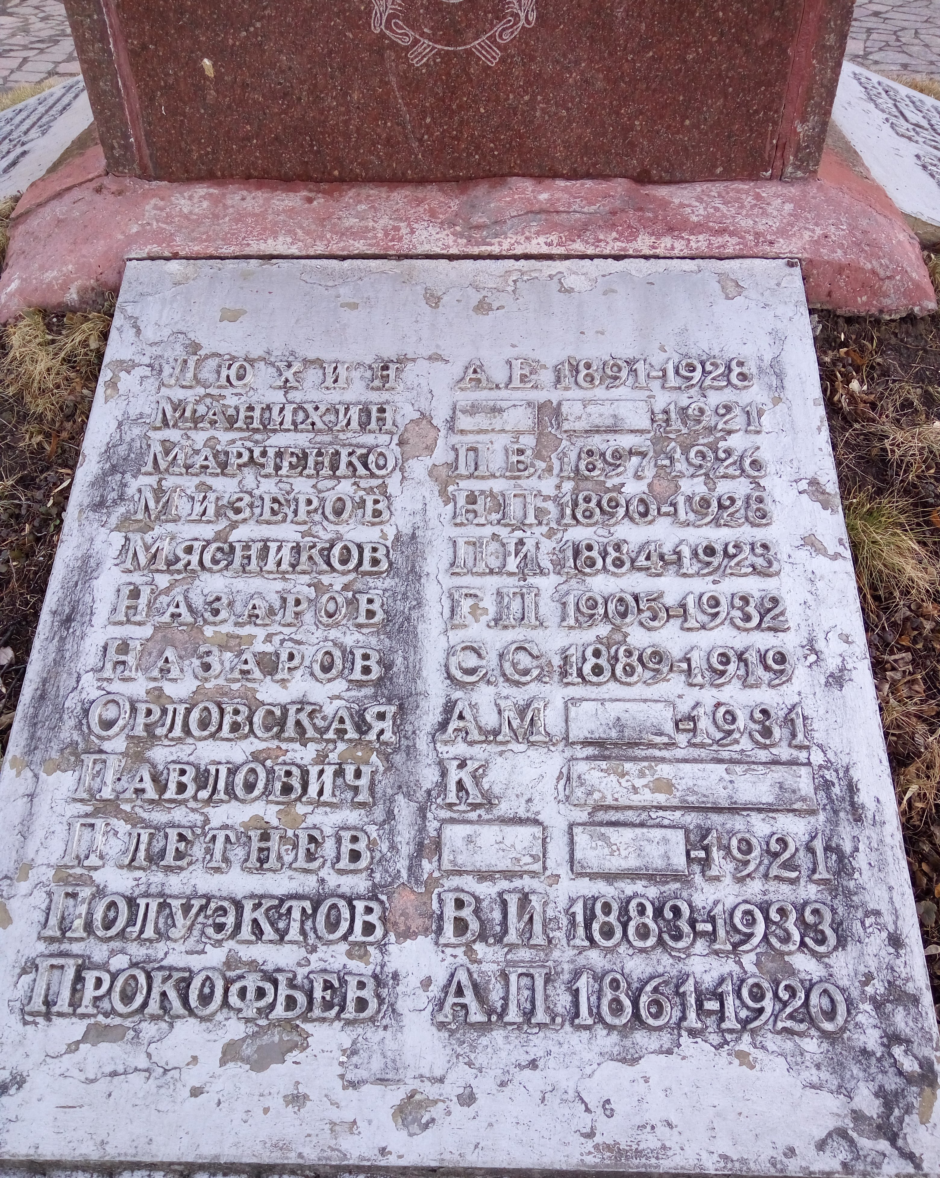 Стела героям гражданской войны 1917-1918 годов (Рязань), бронзовая плита с именами захороненных на Братском кладбище